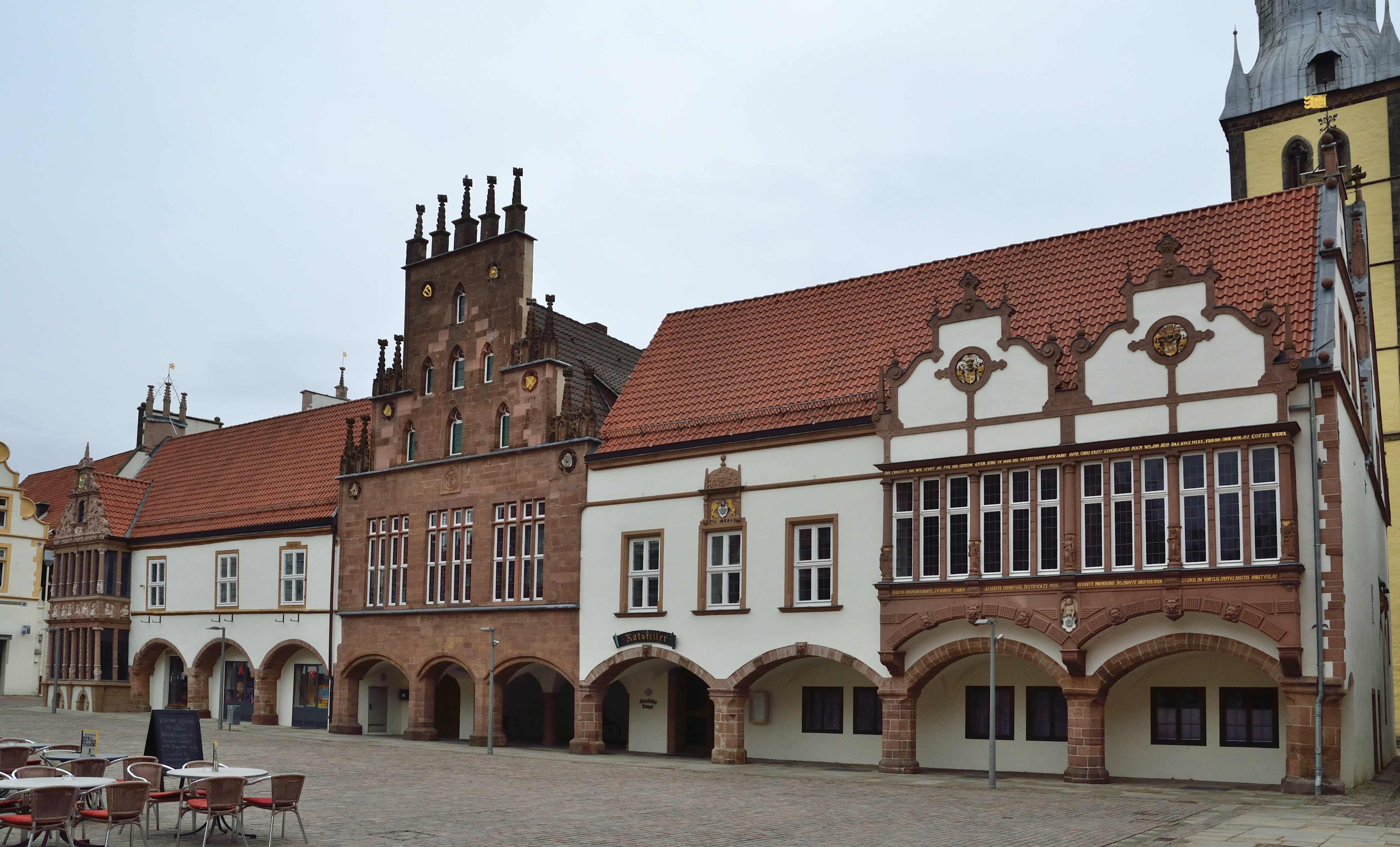 This is a photograph of an architectural monument.It is on the list of cultural monuments of Lemgo Rathaus Lemgo, Ansicht von Südwesten